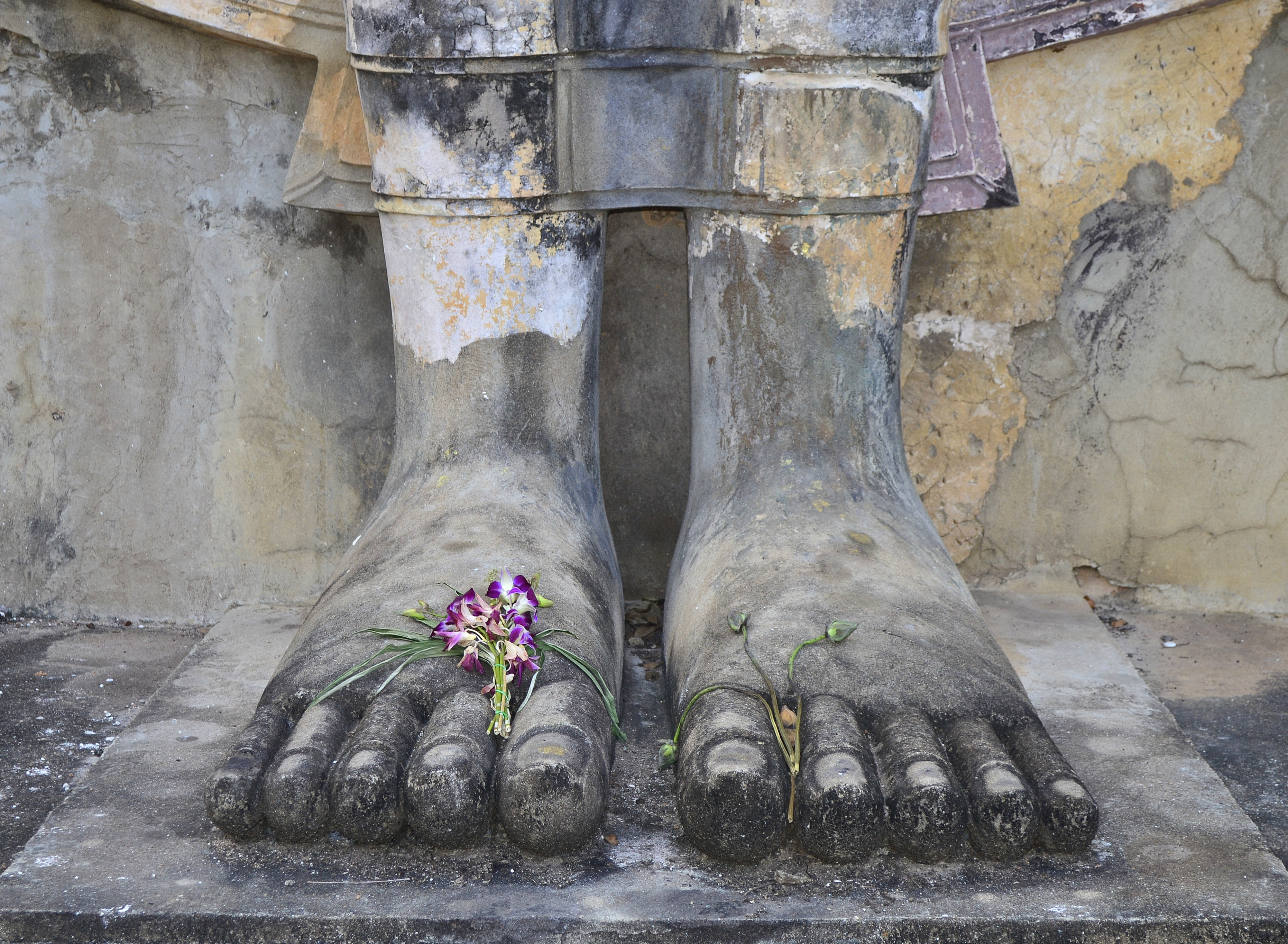 Wat Saphan Hin im Geschichtspark Sukhothai